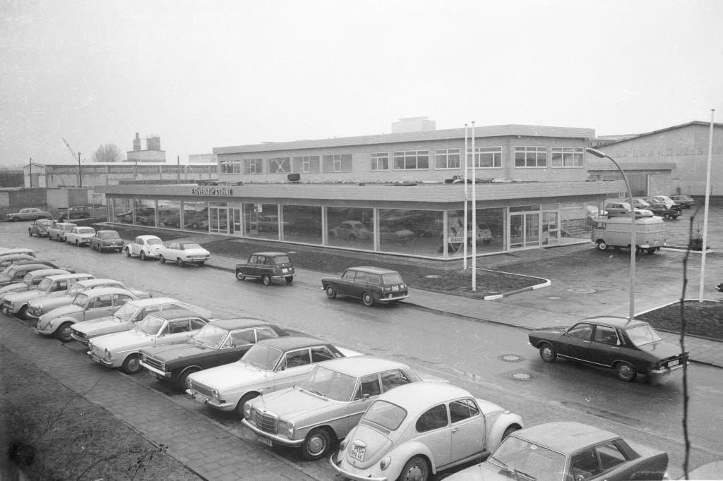 Die Firma ist ein Renault-Vertragshändler.